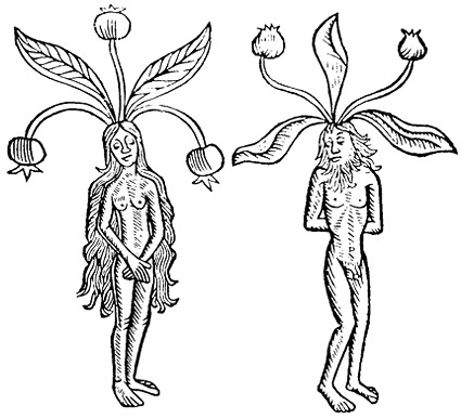 Dibujo de la Mandrágora